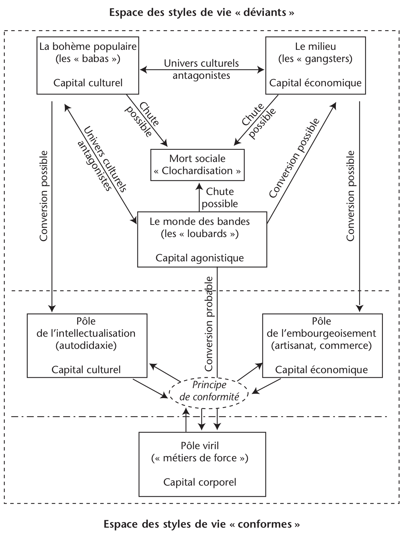 Tableau synoptique_Gérard Mauger